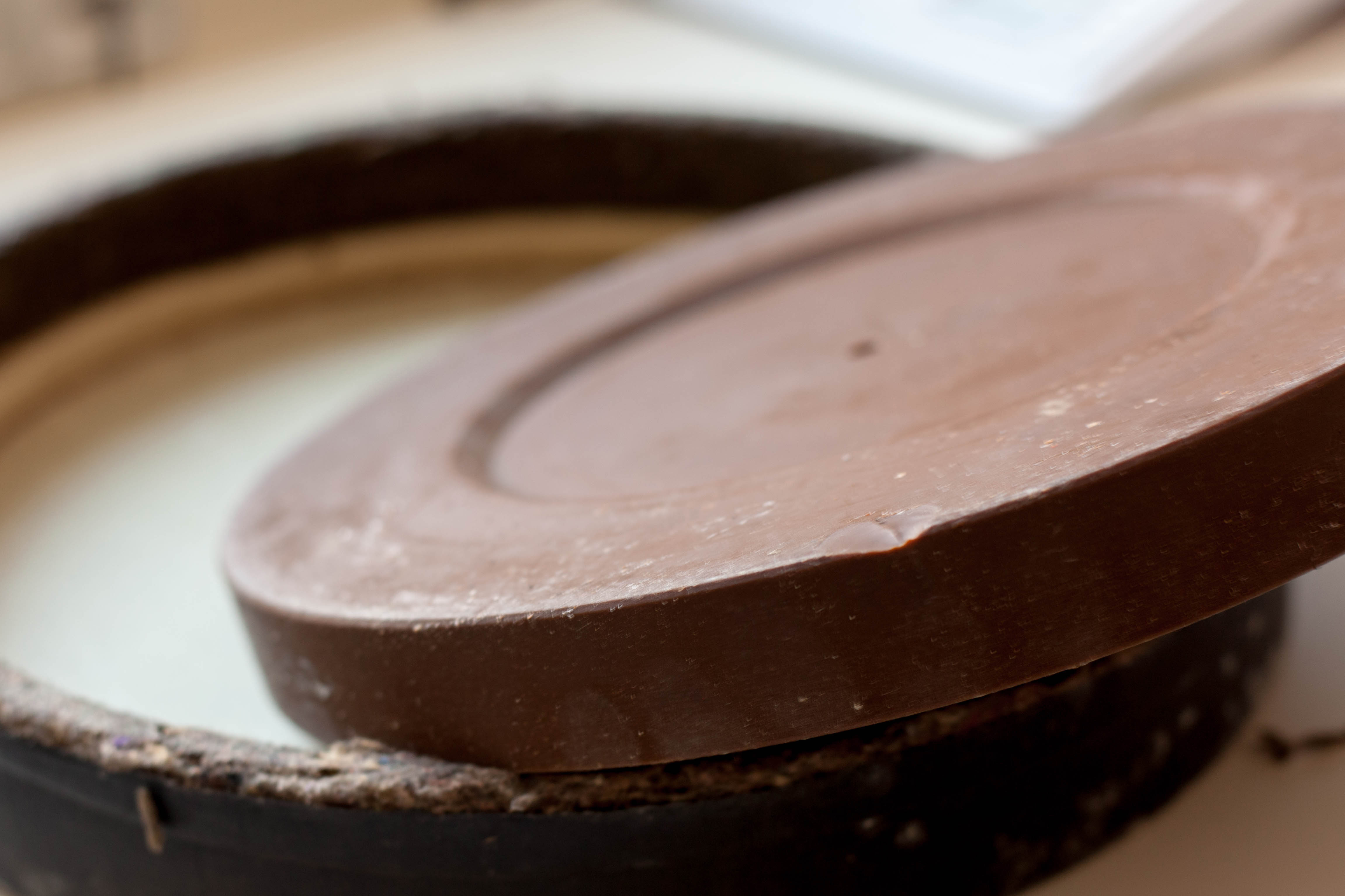 In den 1920er Jahren wurden professionelle Tonaufnahmen mit Wachsplatten erstellt. Sie lösten die Wachszylinder ab. Die Aufnahmelänge betrug 4 Minuten. Typischerweise wurden die mit der Nadel geschriebenen Aufnahmen auf Kupferfolien kopiert, um die Wachsplatte abzuschleifen und wieder zu verwenden. Aufgenommen am 01.11.2017 im Deutschen Rundfunkarchiv. Foto: Maximilian Schönherr